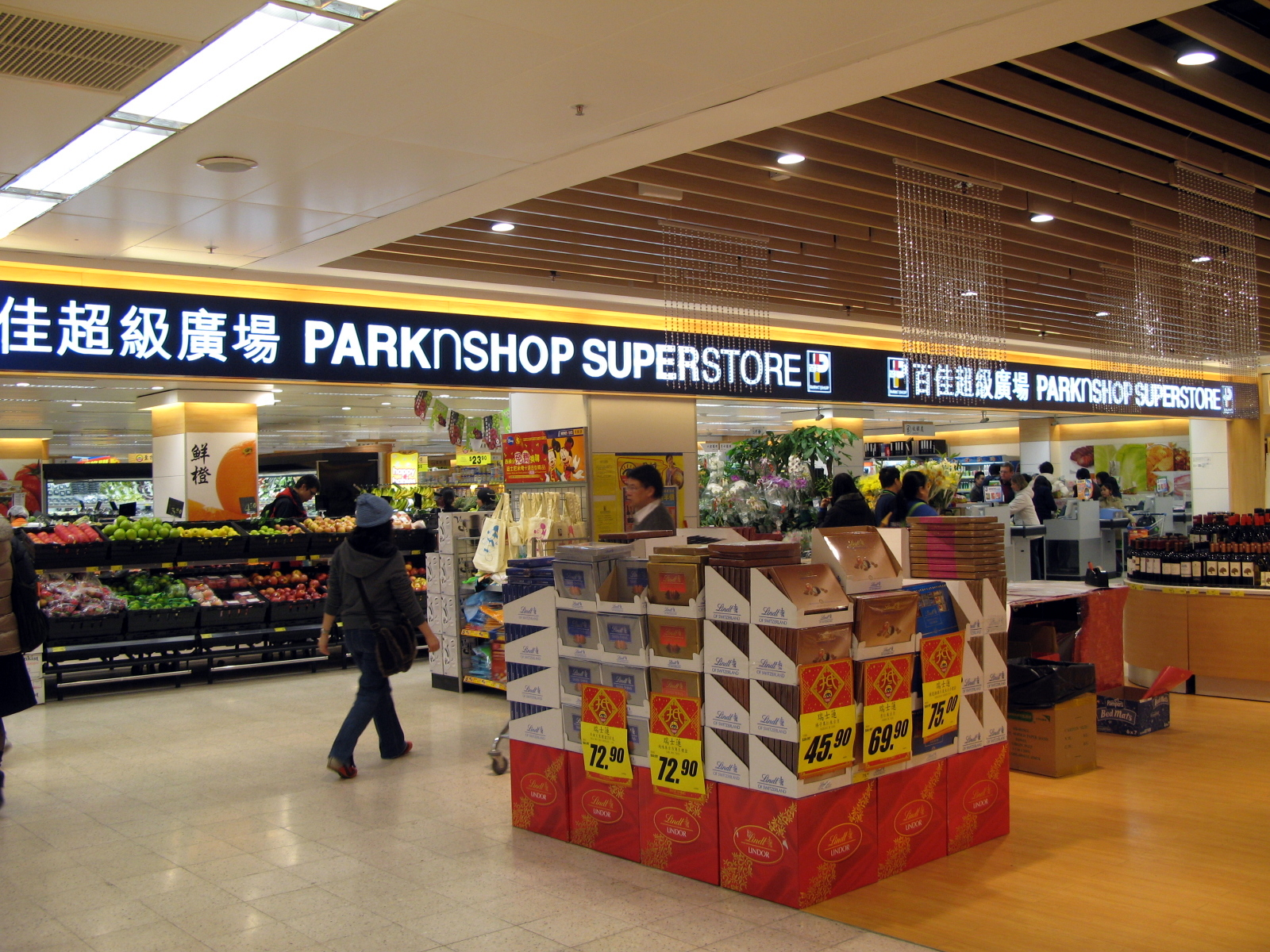 HK Paradise Mall PARKnSHOP